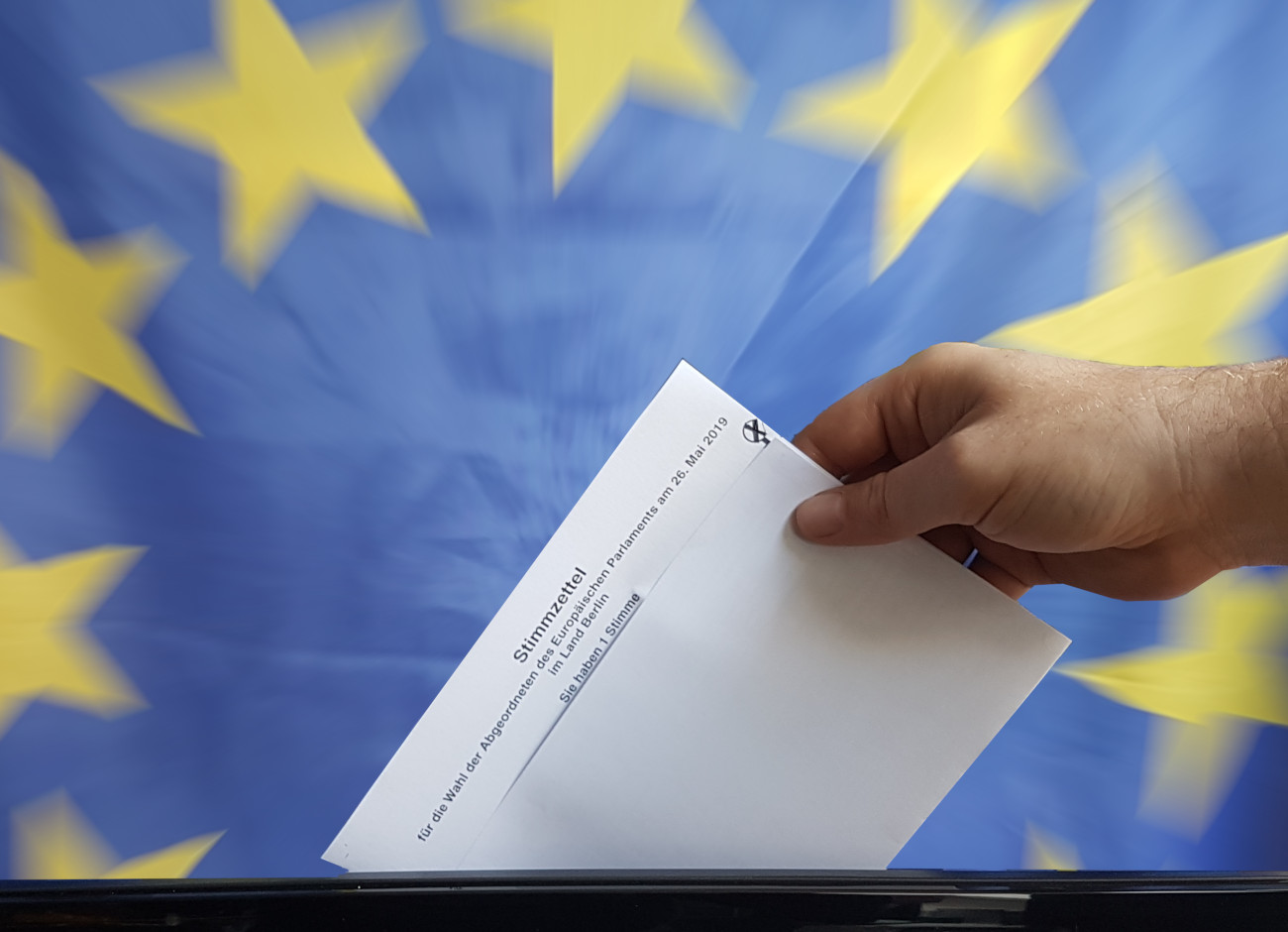 Einwurf eines Stimmzetteldummys vor Europaflagge